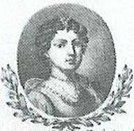 Dobronega Maria